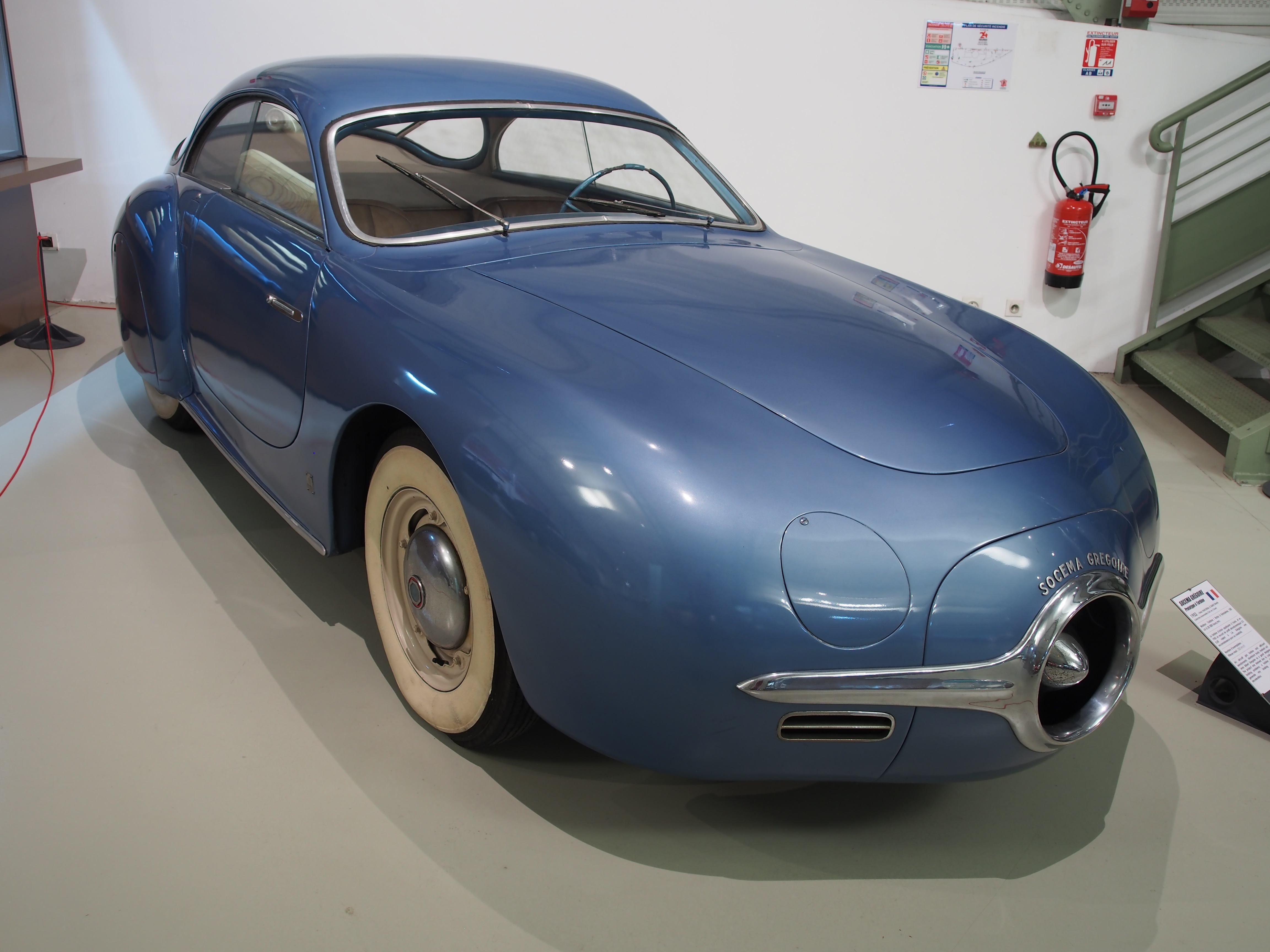 Photographed at Musée des 24 Heures du Mans, France.